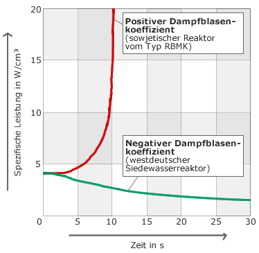 Verlauf der Reaktorleistung bei negativem, bzw. positivem Dampfblasenkoeffizient ohne Regulierung. Vorlage und Informationen: Unister sowie Dampfblasenkoeffizient